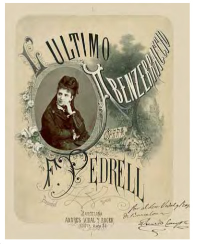 Ebe Treves - L'ultimo Abenzerraggio